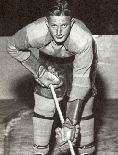 Hans Öberg